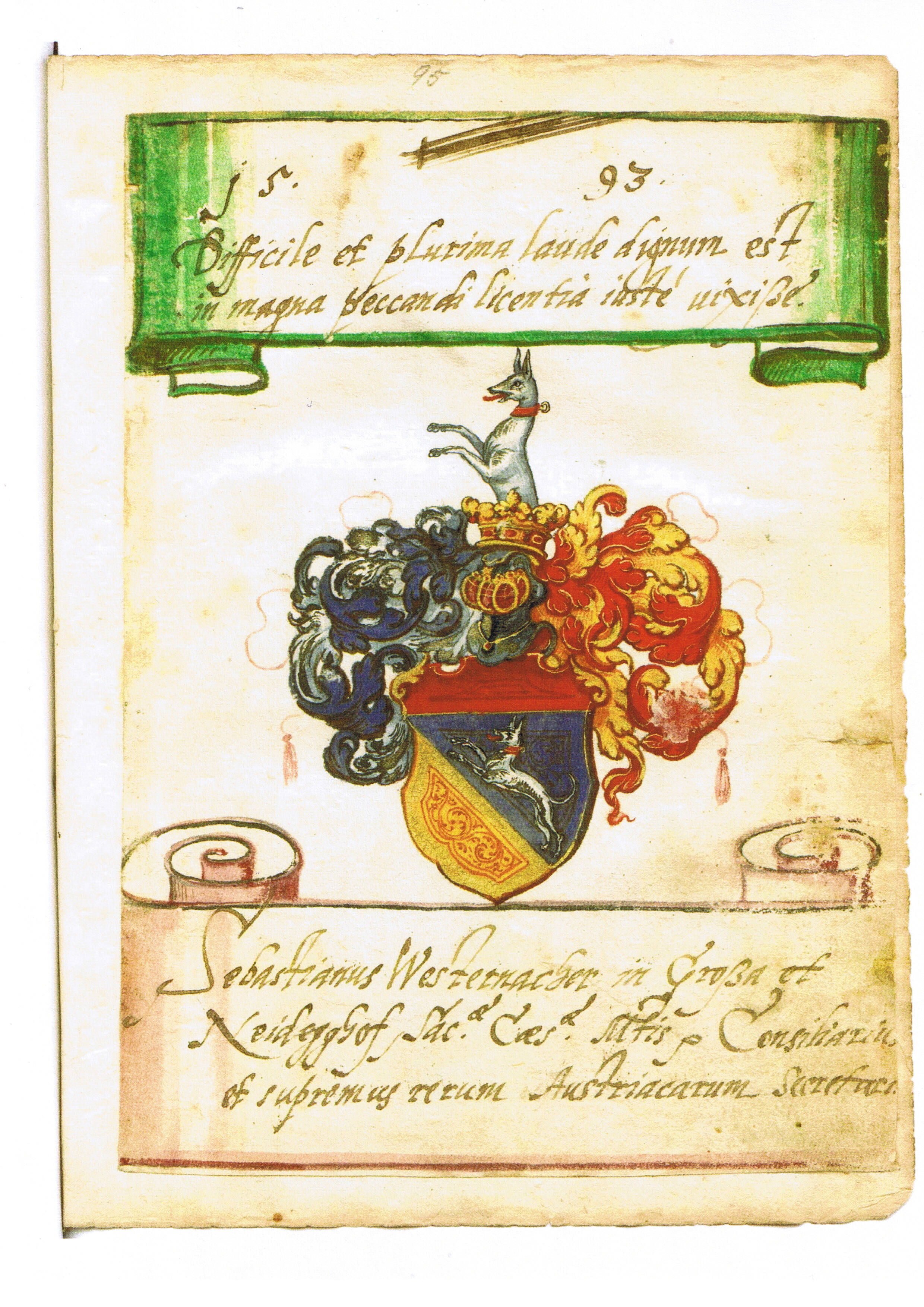 Wappenbrief des Sebastian Westernacher von Großa (Grossa)